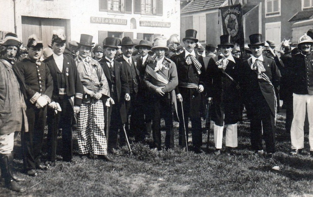 La fanfare bigophonique des Loge-en-Josas : Les Joyeux Bigophoneux.